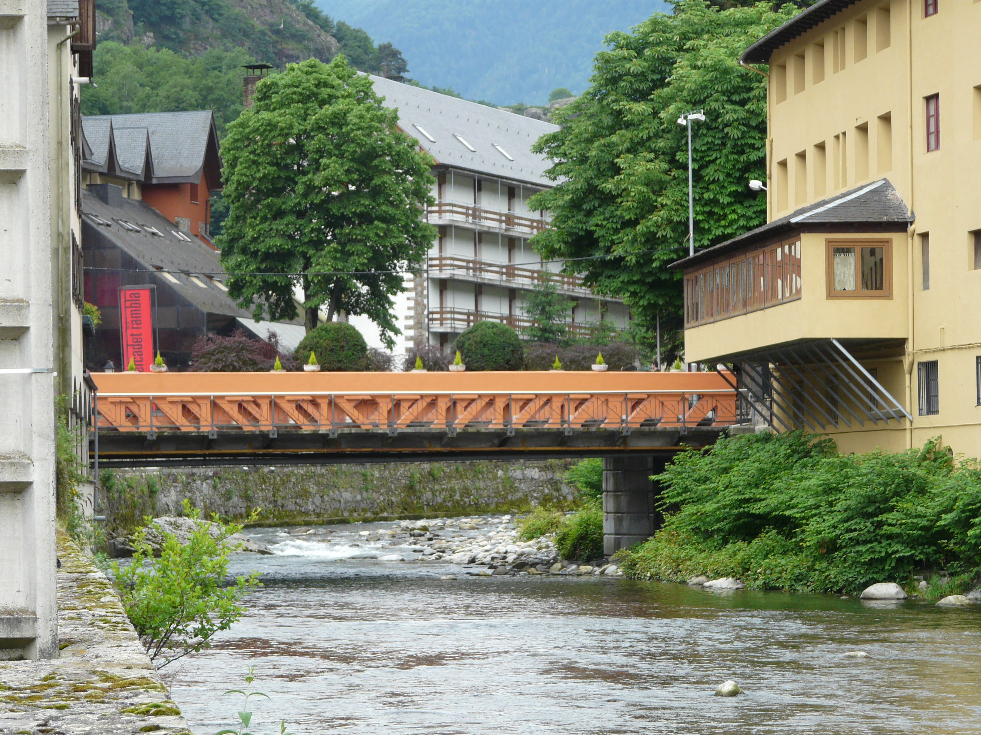 Le pont central sur la Garonne, Les, Val d'Aran, Catalogne, Espagne.